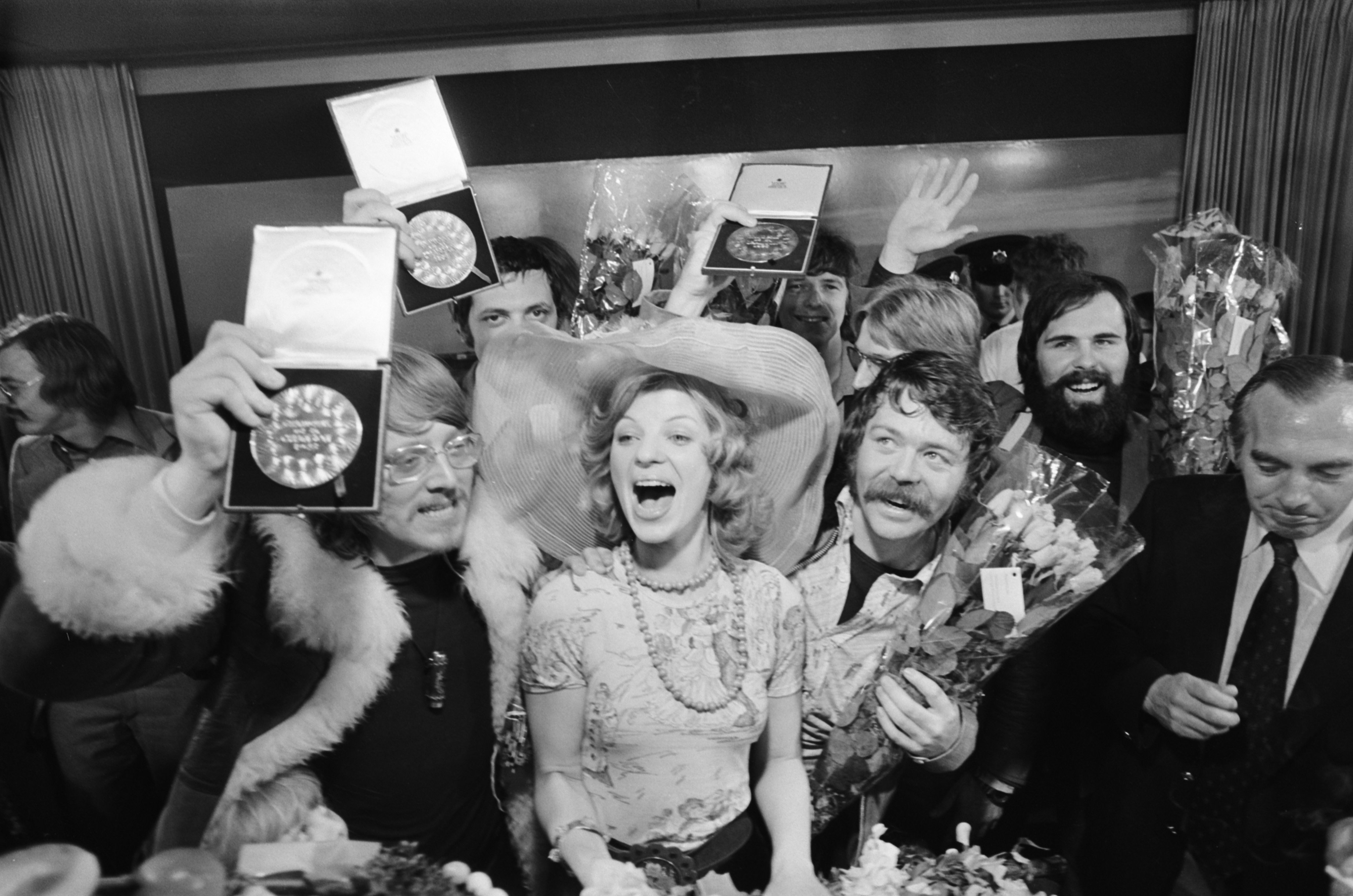 Collectie / Archief : Fotocollectie Anefo Reportage / Serie : [ onbekend ] Beschrijving : Teach-in (winnaar Eurovisie Songfestival) terug op Schiphol; Teach-in na aankomst Datum : 23 maart 1975 Locatie : Noord-Holland, Schiphol Trefwoorden : muziek, popgroepen, songfestivals, vliegvelden Persoonsnaam : Eurovisiesongfestival, Teach-in Instellingsnaam : Schiphol Fotograaf : Mieremet, Rob / Anefo Auteursrechthebbende : Nationaal Archief Materiaalsoort : Negatief (zwart/wit) Nummer archiefinventaris : bekijk toegang 2.24.01.05 Bestanddeelnummer : 927-8208